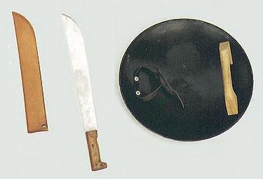 Photo de deux armes traditionnelles des Kobudo d'Okinawa